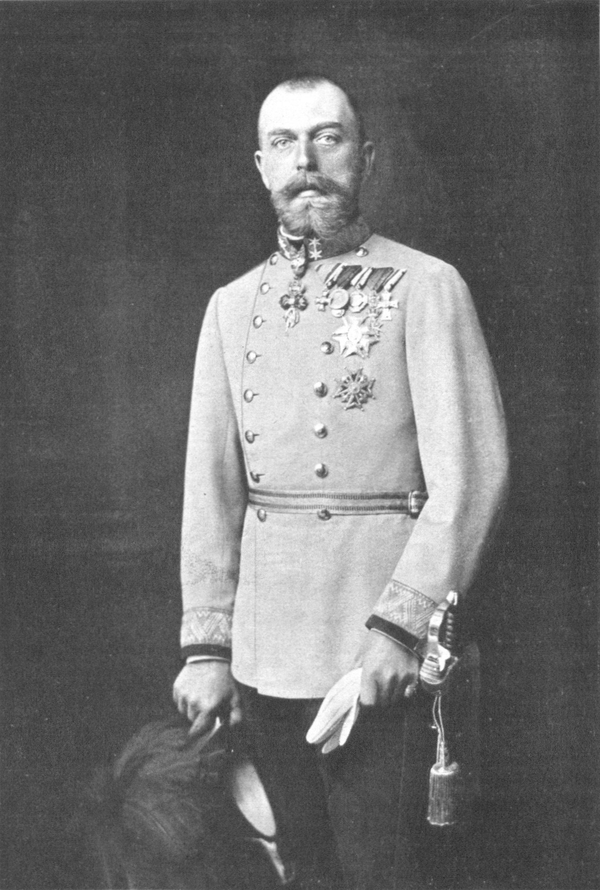 Erzherzog (archduke) Josef Ferdinand (1872-1942), Austrian-Hungarian general